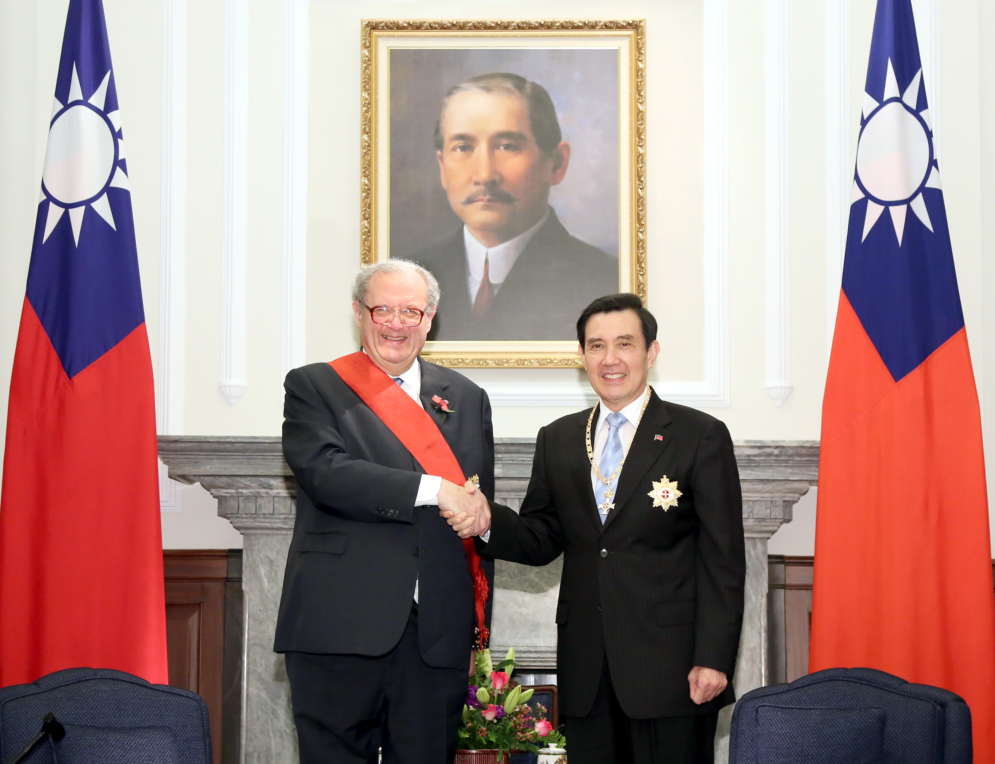 中文（台灣）: 中華民國總統馬英九（右）頒贈馬爾他騎士團大教長馬修·費斯汀（左）采玉大勳章，暨接受馬修·費斯汀回贈馬爾他騎士團最高等級功績領綬勳章。